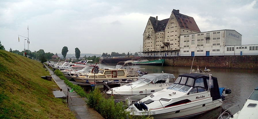 Der Hafen in Kassel